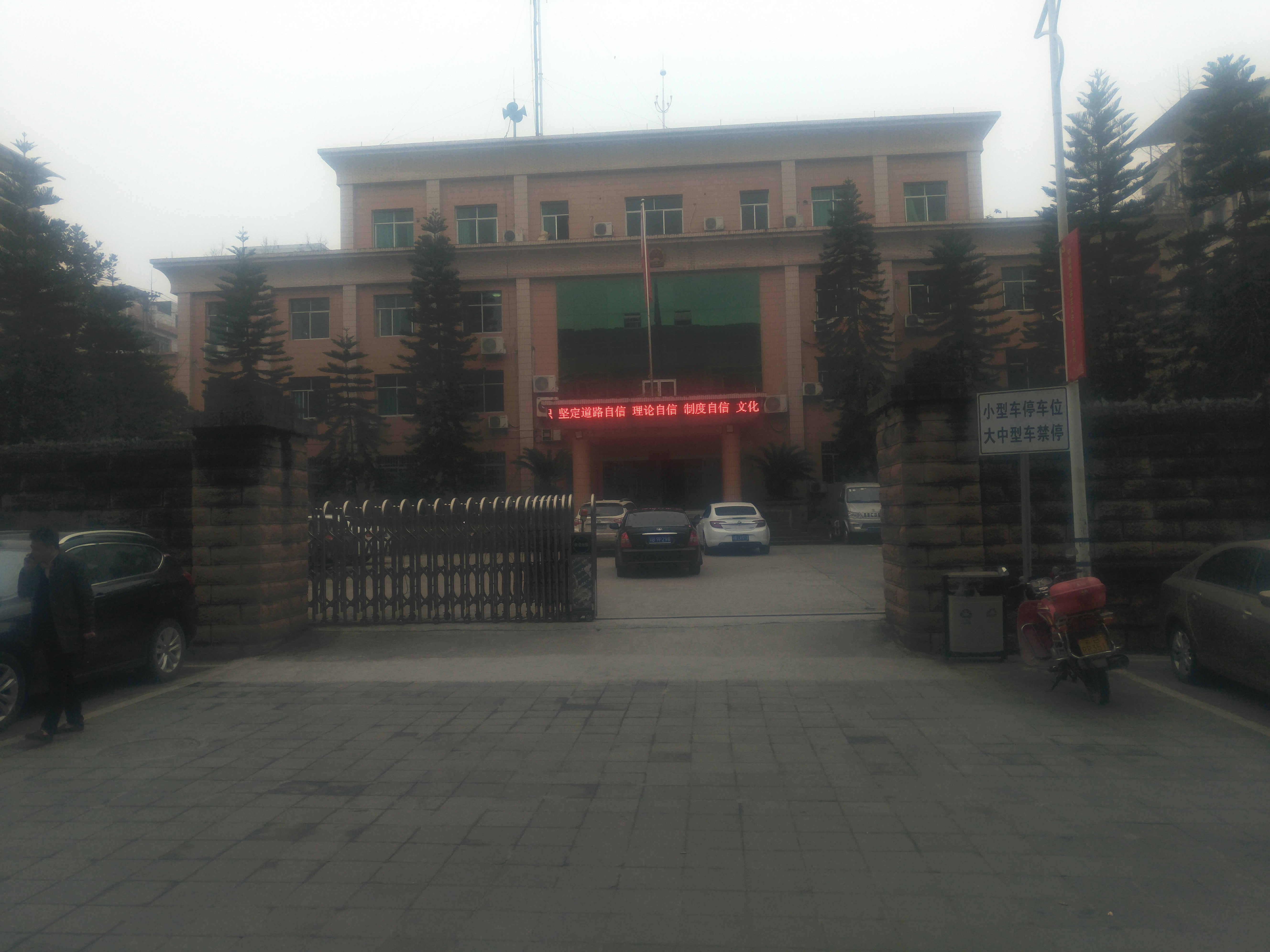 A government building in shuanglong town, longevity district, chongqing, China